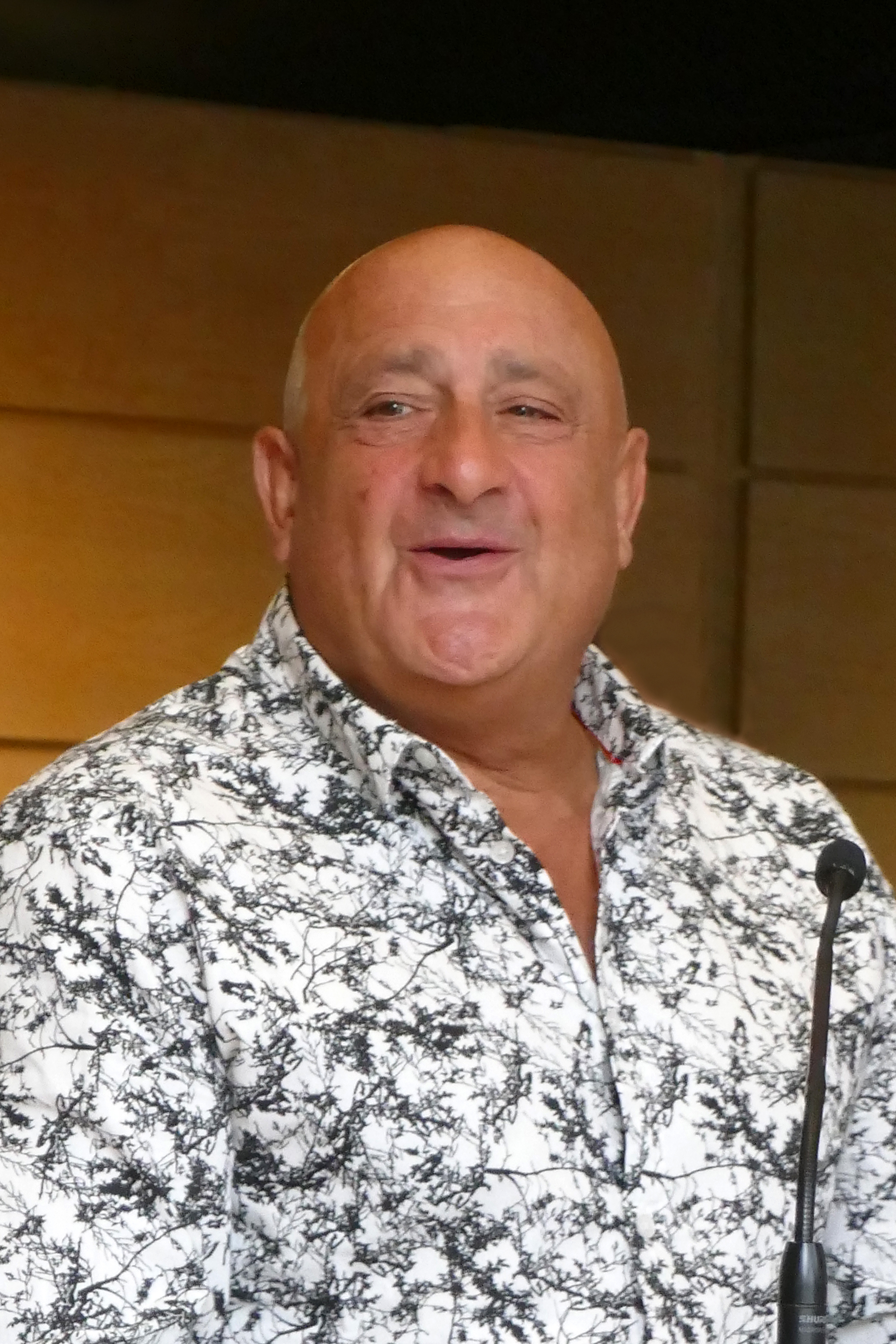 Raphaël Jerusalmy, lauréat du prix Amerigo Vespucci 2017, pour son livre Evacuation. Festival international de géographie.